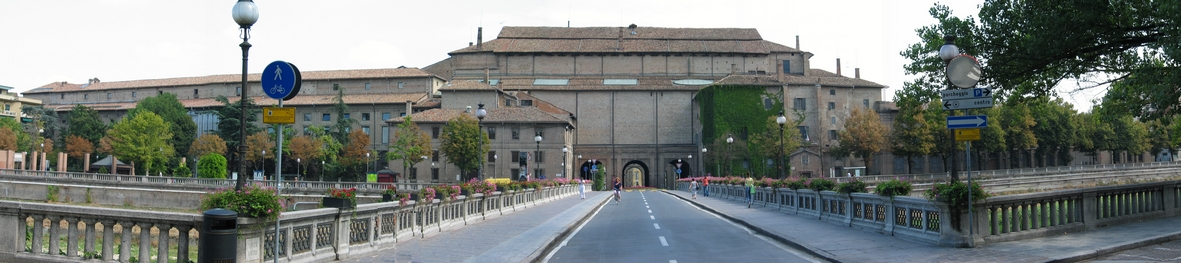 La Pilotta vue depuis la rivière Parma